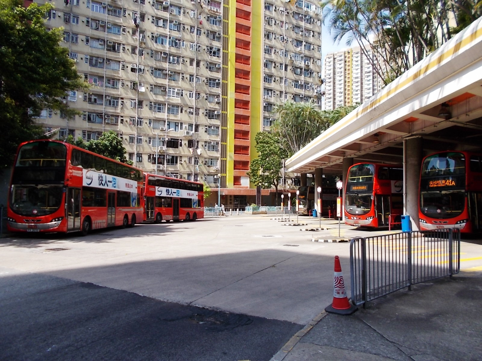 青衣長安巴士總站(2020年)